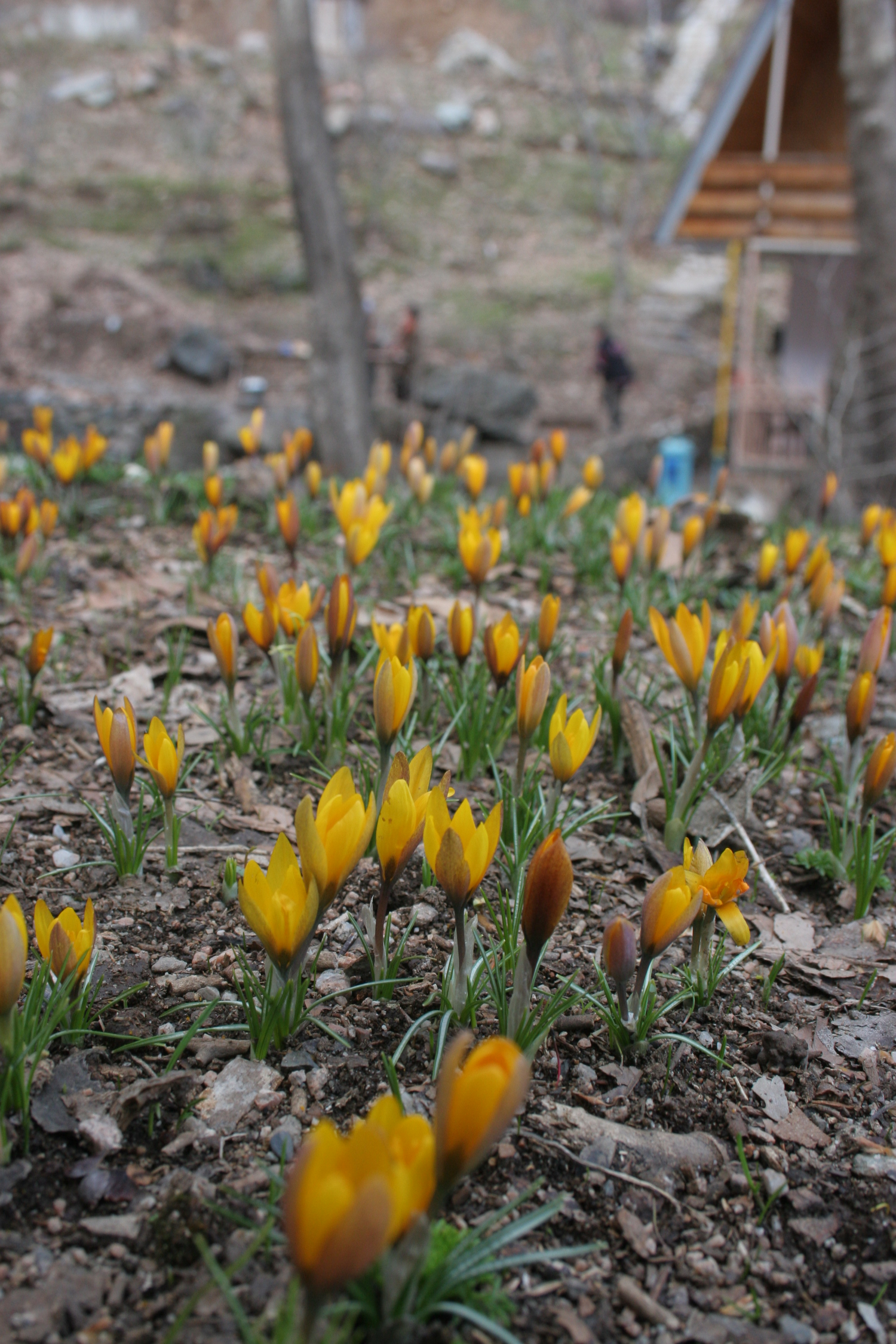 Цветы подснежники расцветают в предгорных районах Таджикистана в начале февраля месяца.